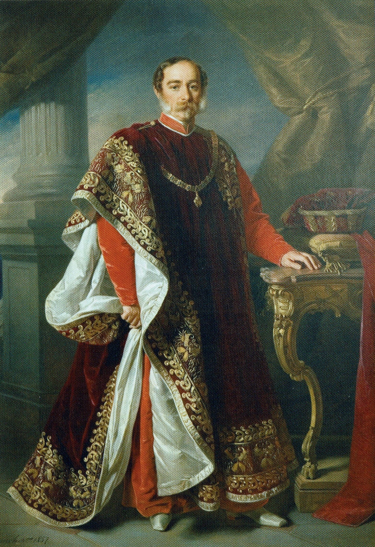 Fürst Karl Egon II. von Fürstenberg (1794-1854) als Ritter vom Goldenen Vlies